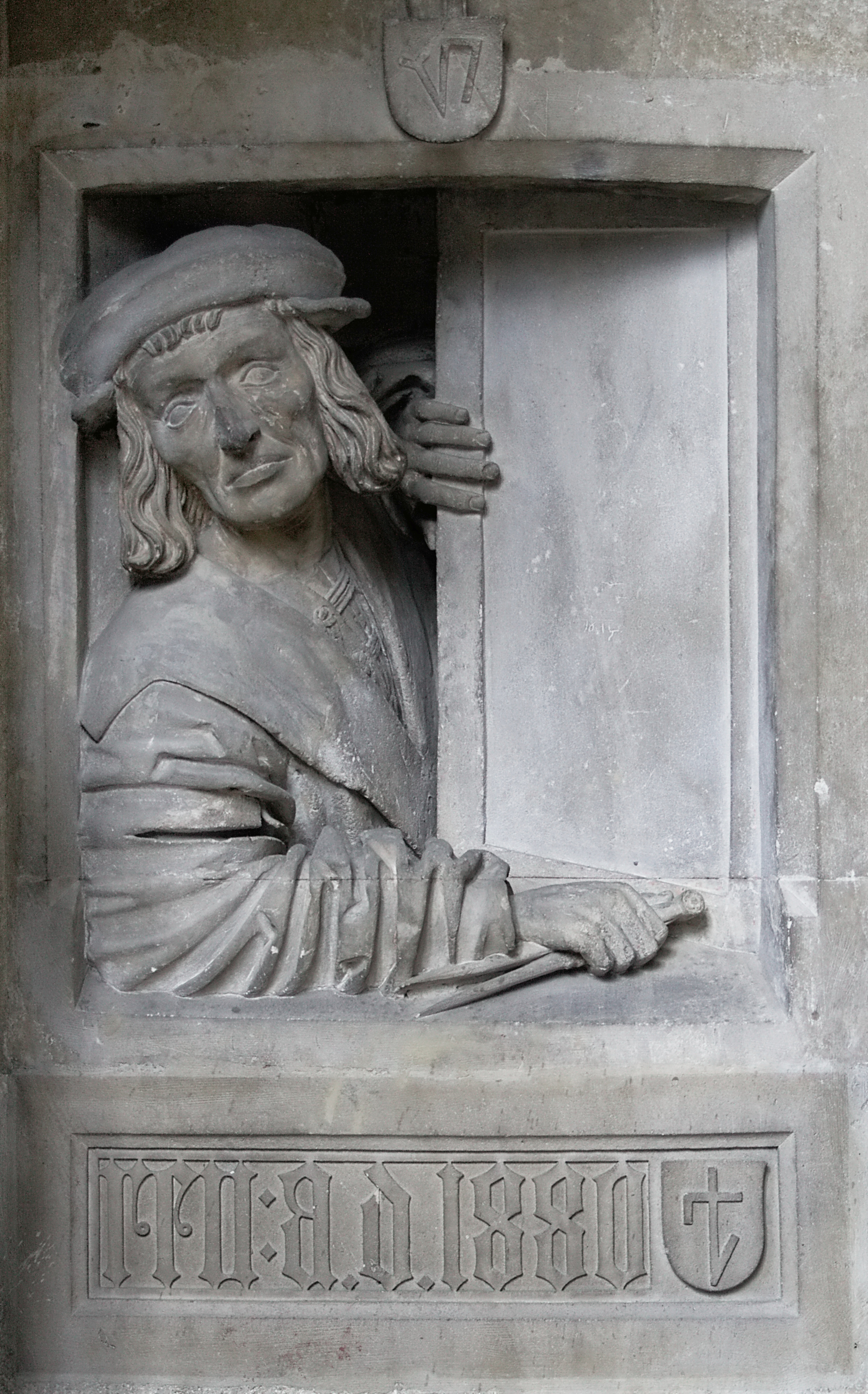 Austria, Vienna, Stephansdom, Fenstergucker